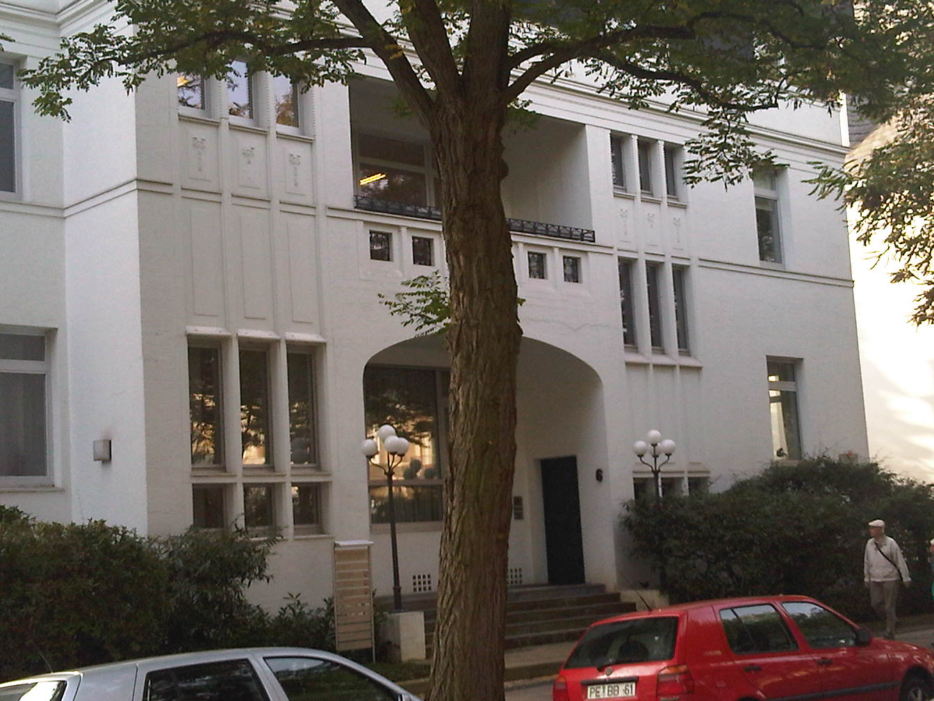 Sogenannte Hindenburg-Villa in Hannover, Stadtteil Zoo oder auch Hindenburgviertel. Wohnhaus Paul v. Hindenburgs von 1919-1925